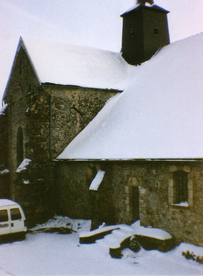 Eglise du village de Corrobert, Marne, France.